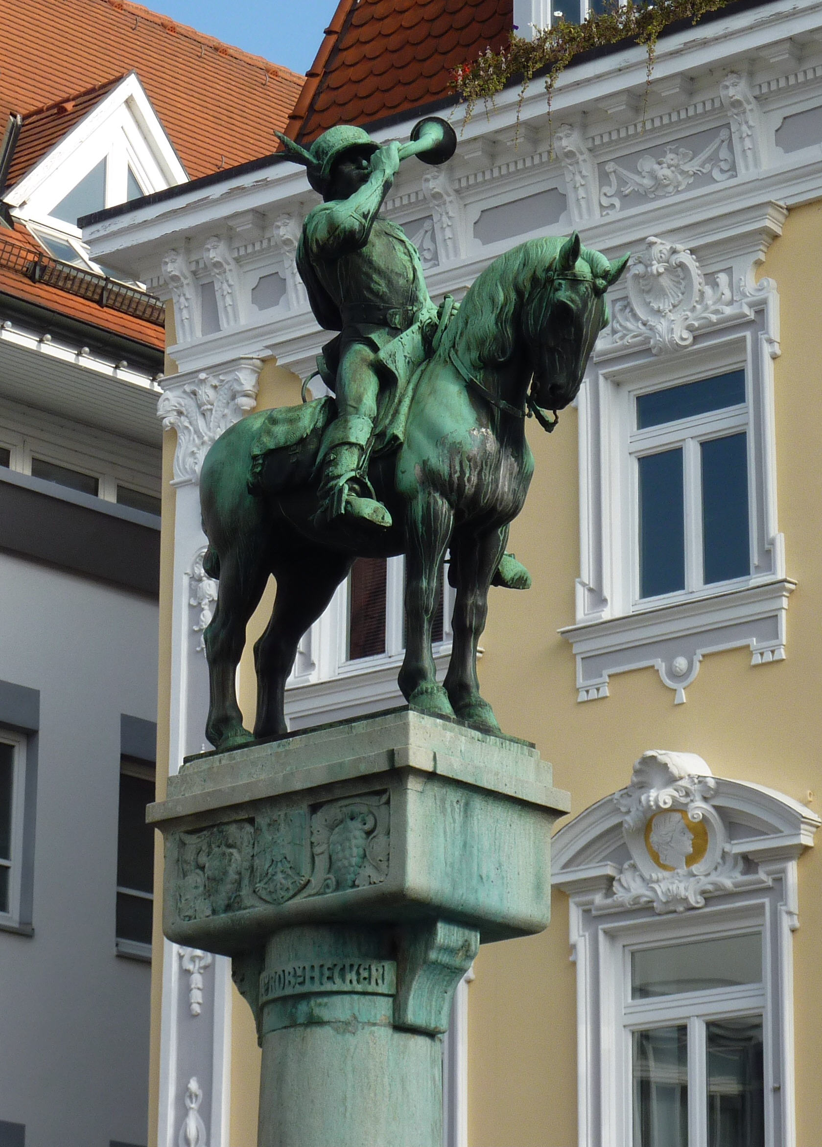 Postmichelbrunnen mit Stifterinschrift